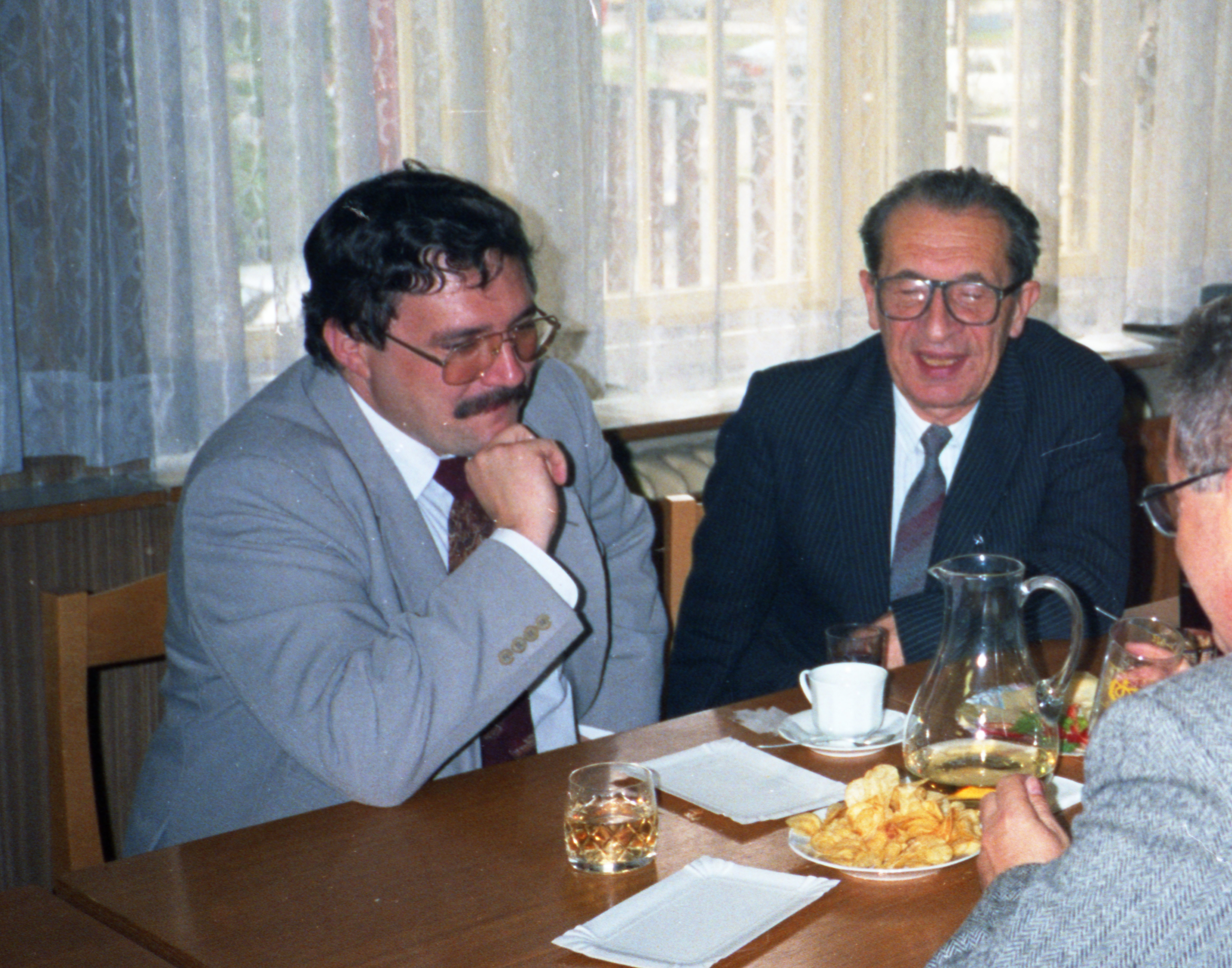 Josef Lux a Václev Vaško na oslavě narozenin B.Svobody